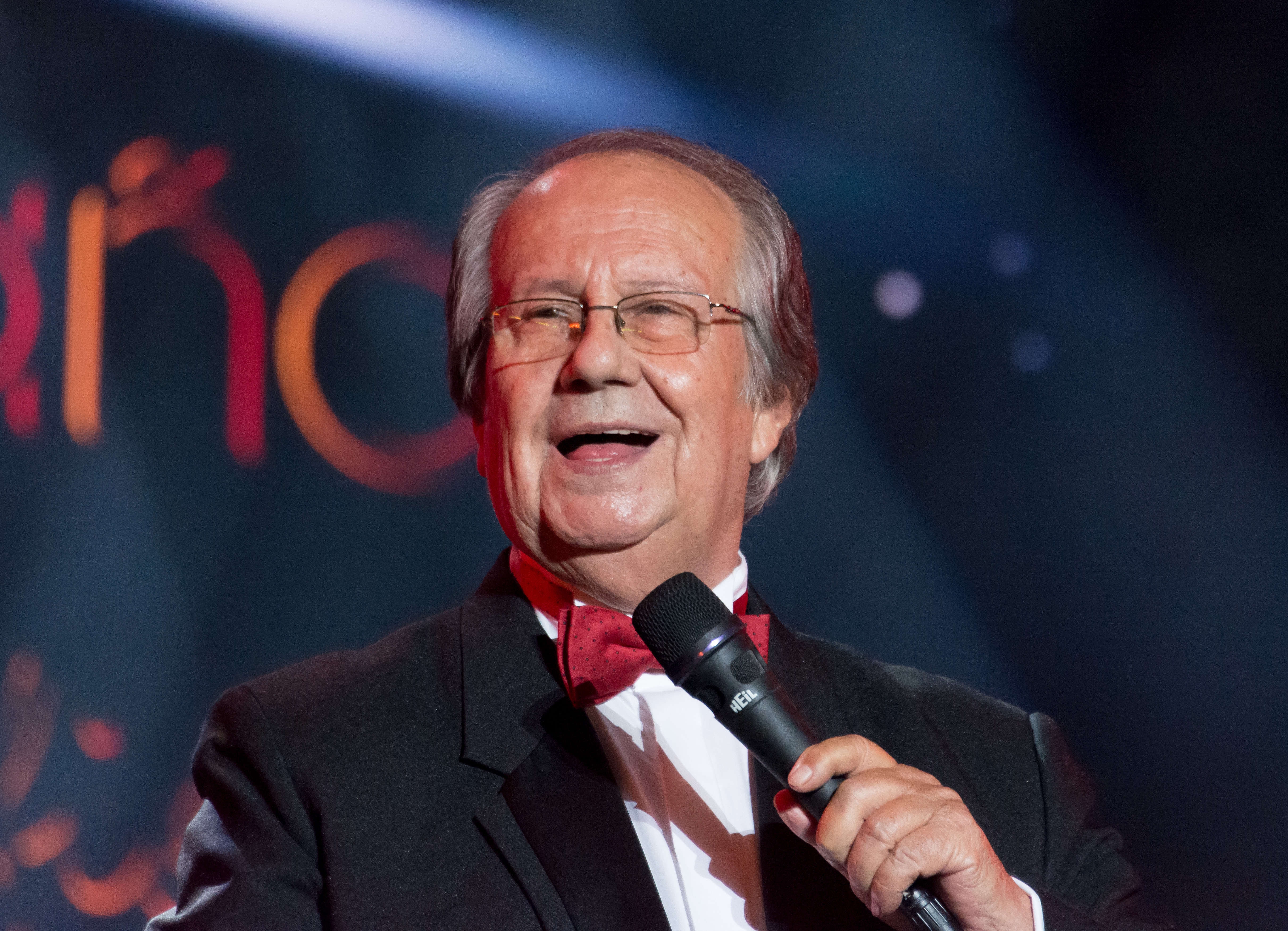 Expo Quillota 2020, Estadio Municipal Lucio Fariña Fernández, Quillota, Región de Valparaíso, Chile